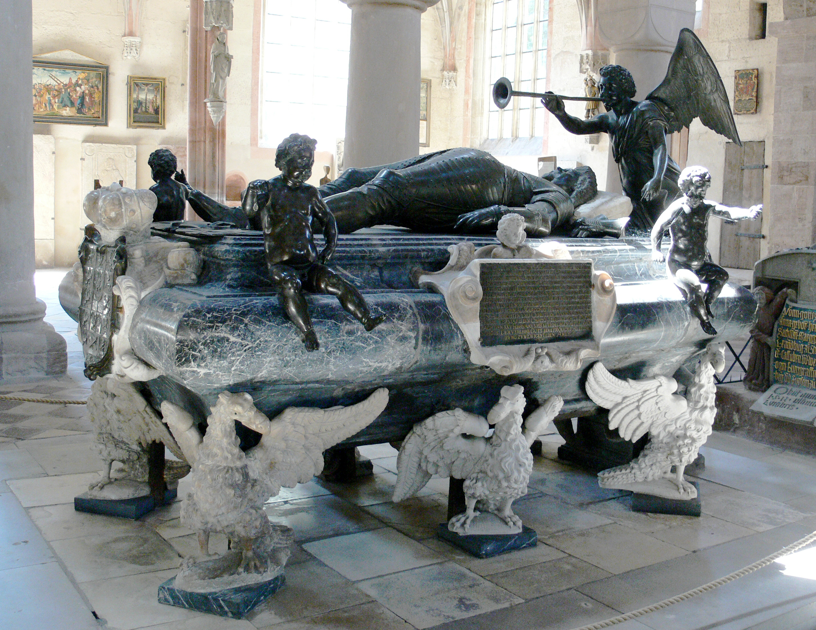 Heilsbronn, Münster St. Marien und Jakobus Grabmal des Markgrafen Joachim Ernst von Brandenburg-Ansbach († 1625), errichtet 1625–1726